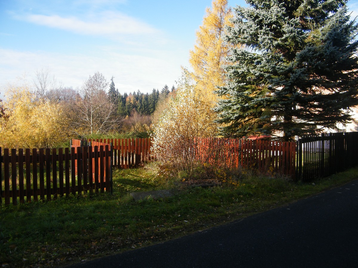 Ruiny kaple svatého Jana Nepomuckého na Janovce